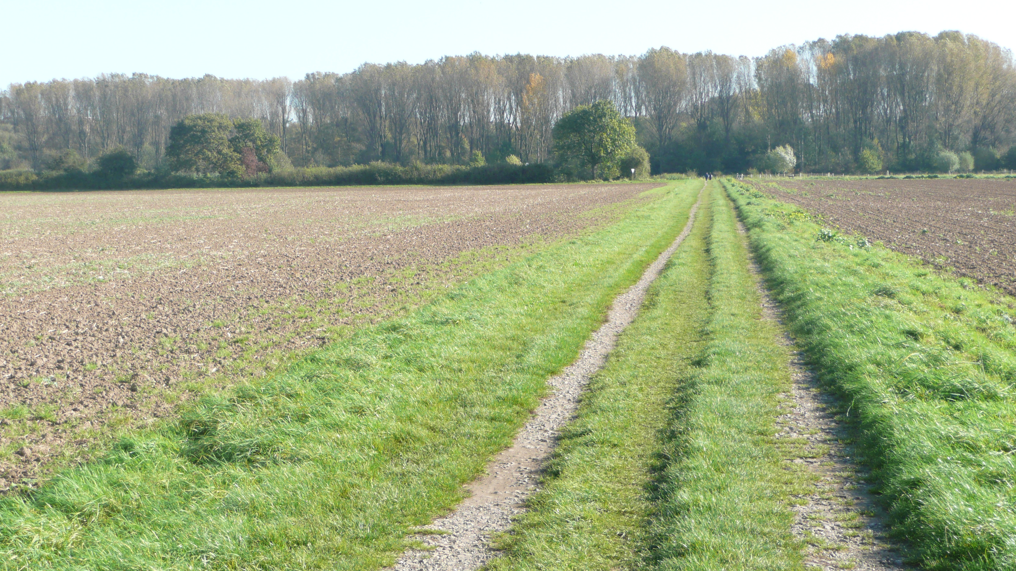 Alte Kölnische Landstraße Trasse 5, Haus Bürgel - Hellerhof